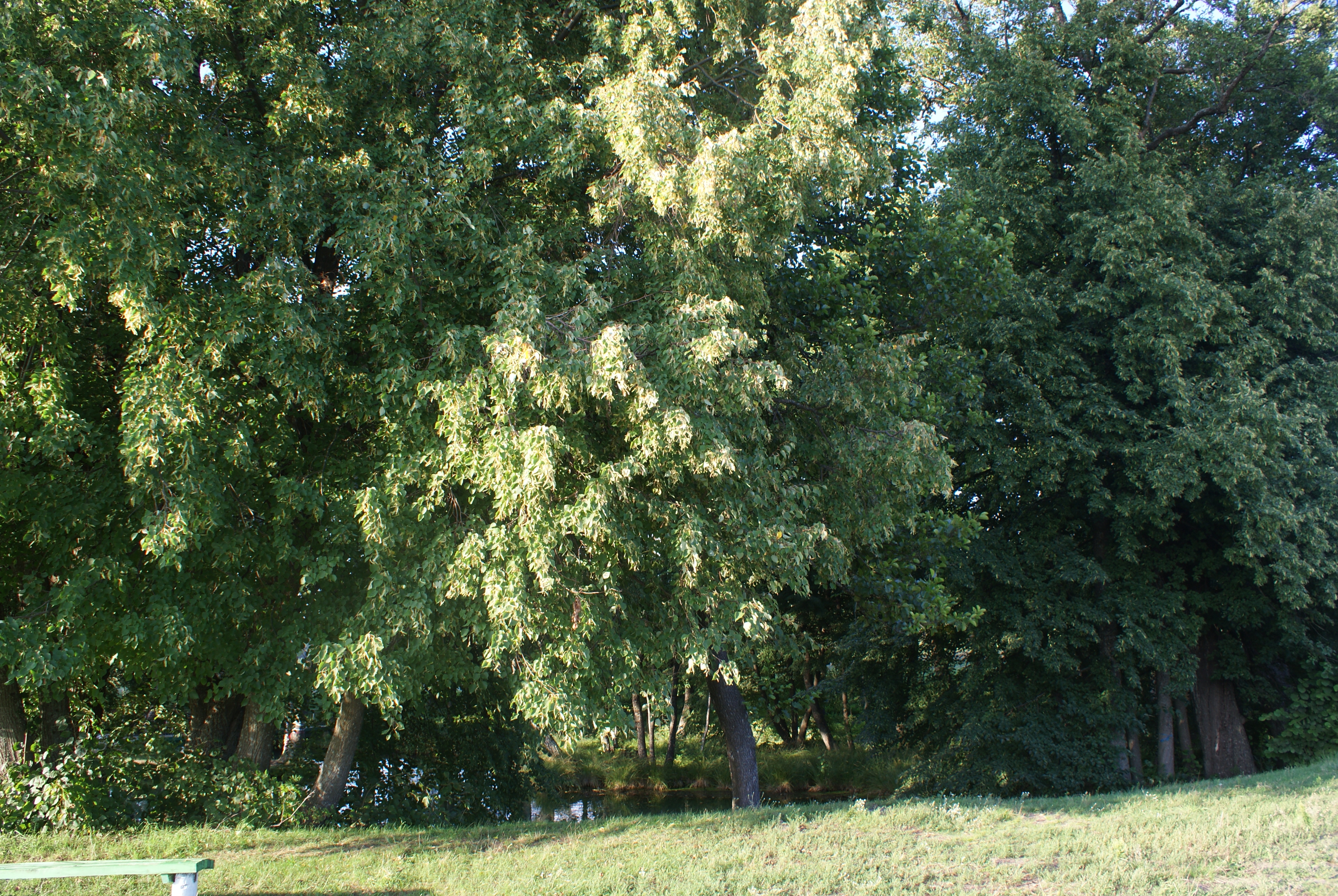 Блакітная крыніца